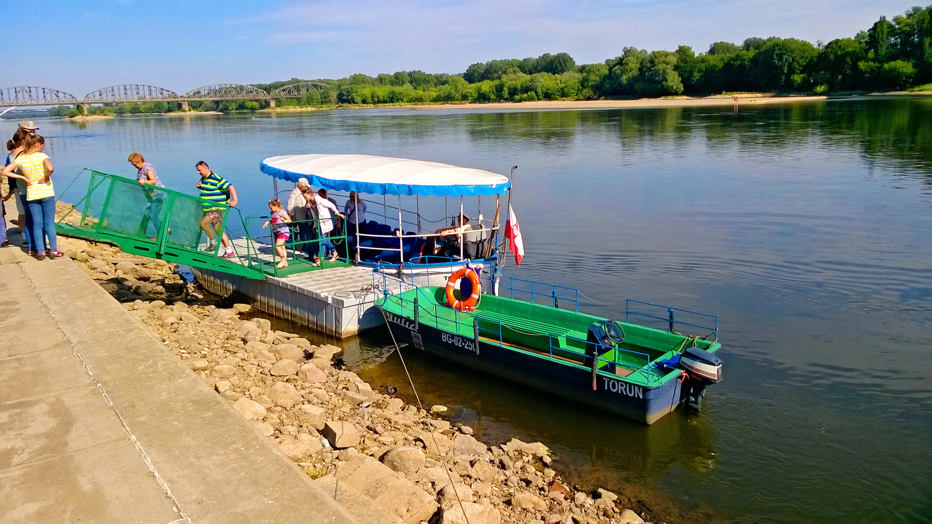 Wisła na wysokości Starego Miasta w Toruniu